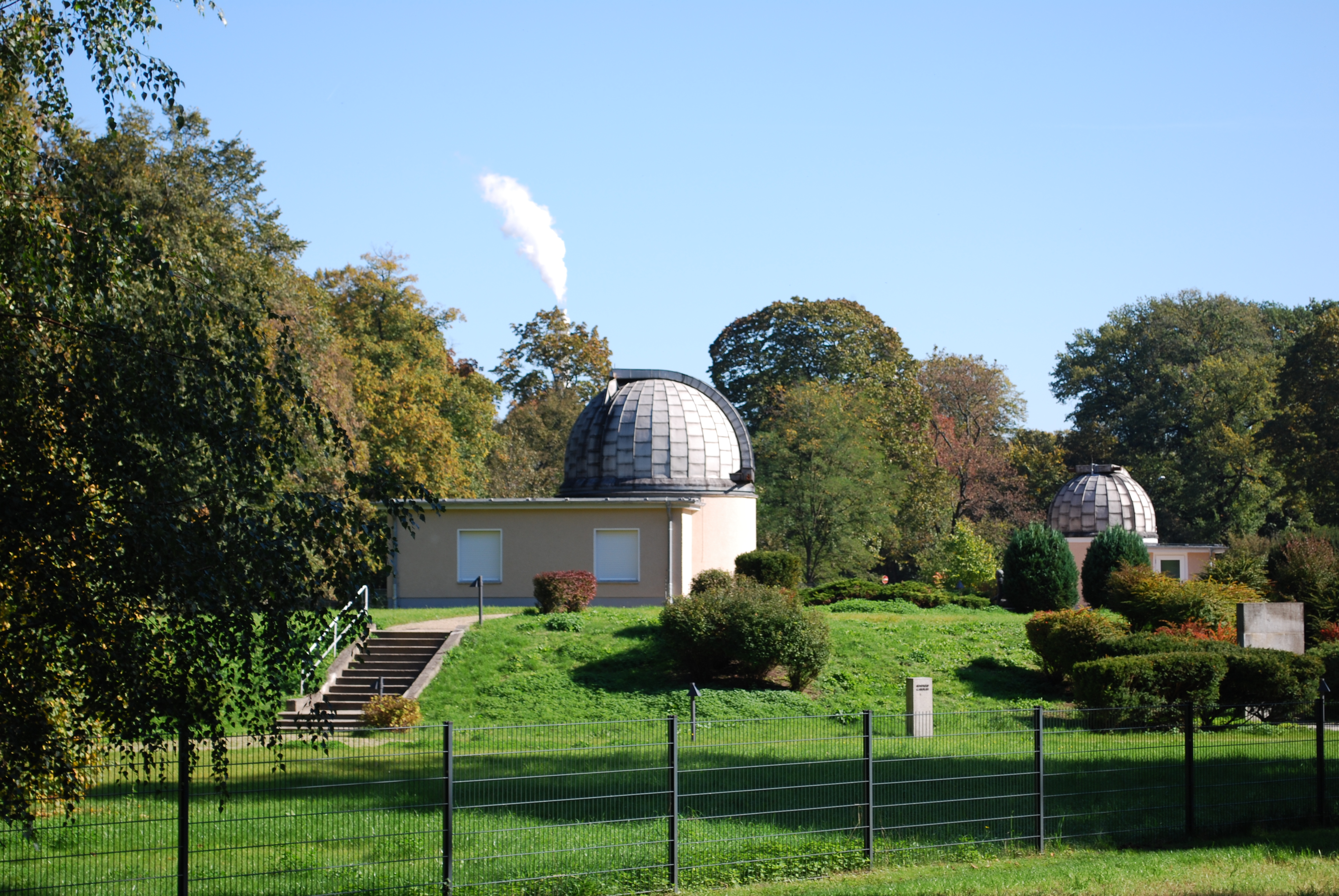 Archenhold-Sternwarte, kleine Kuppeln, Südansicht